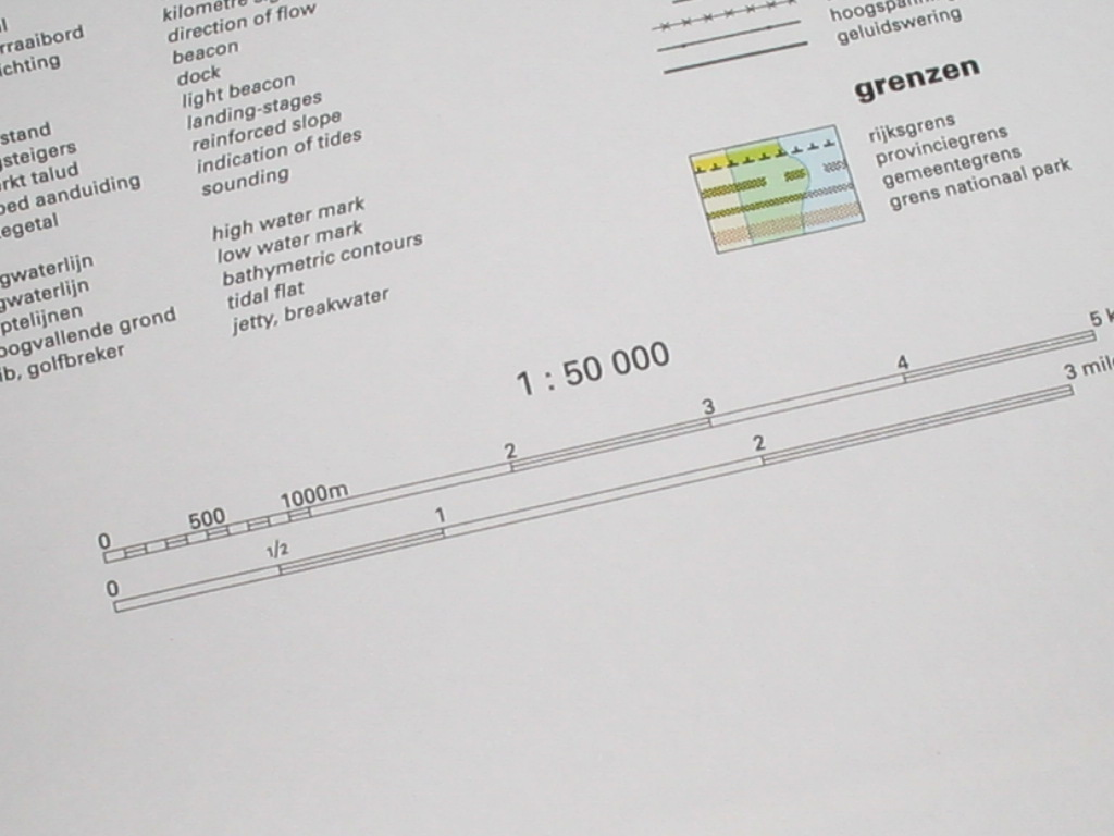 Piirustus, johon on merkitty mittakaava 1:50 000 ja alapuolelle piirretty mittajana.